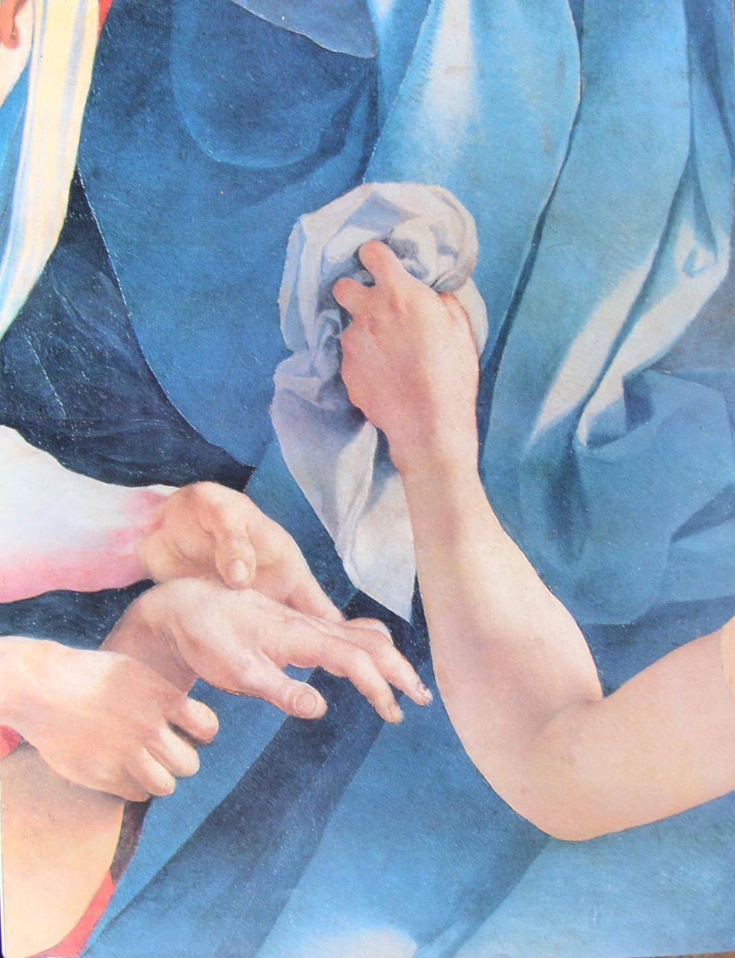 Fresque de la Descente de Croix de Pontormo